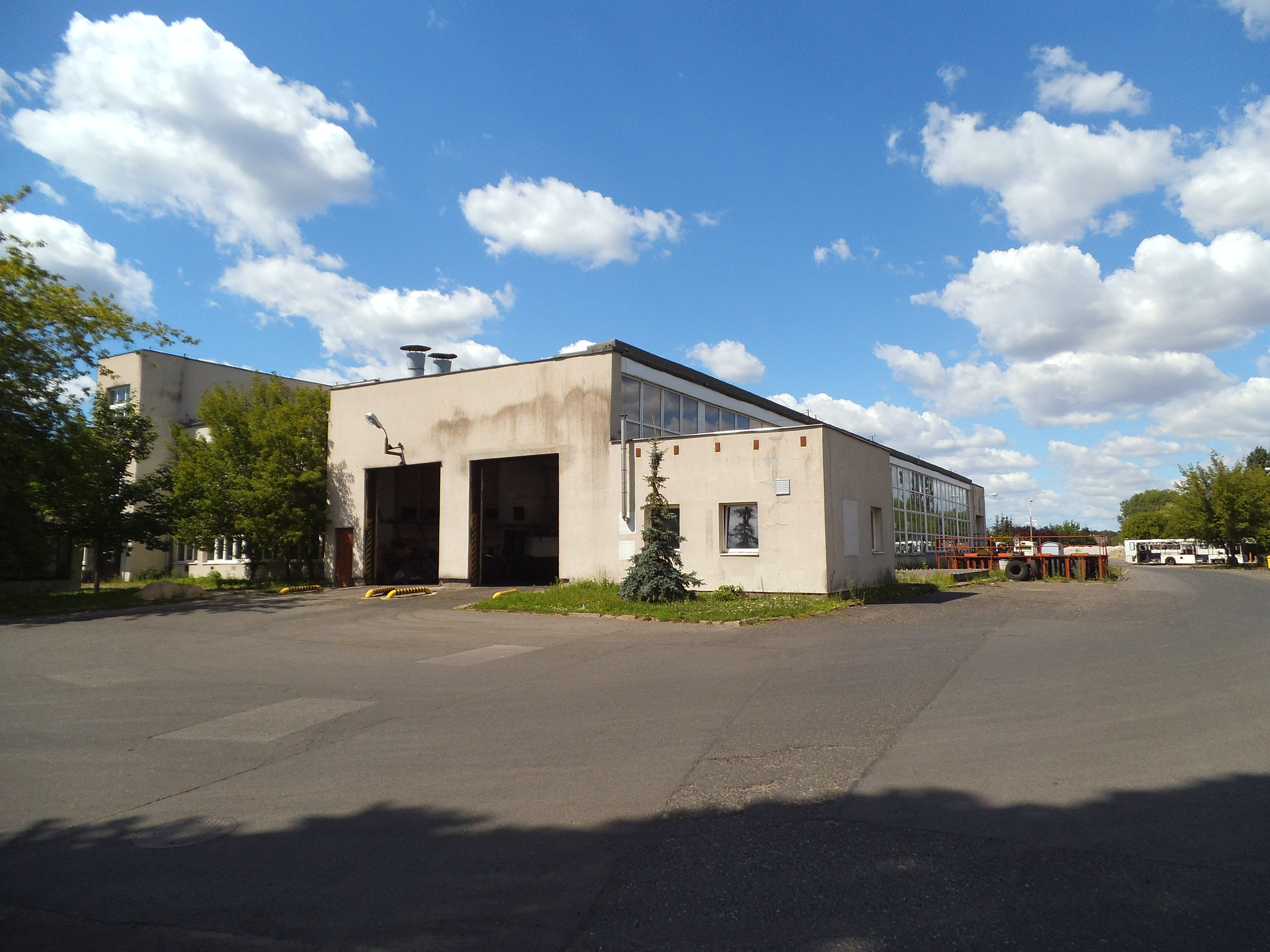 Zajezdnia autobusowa w Toruniu1